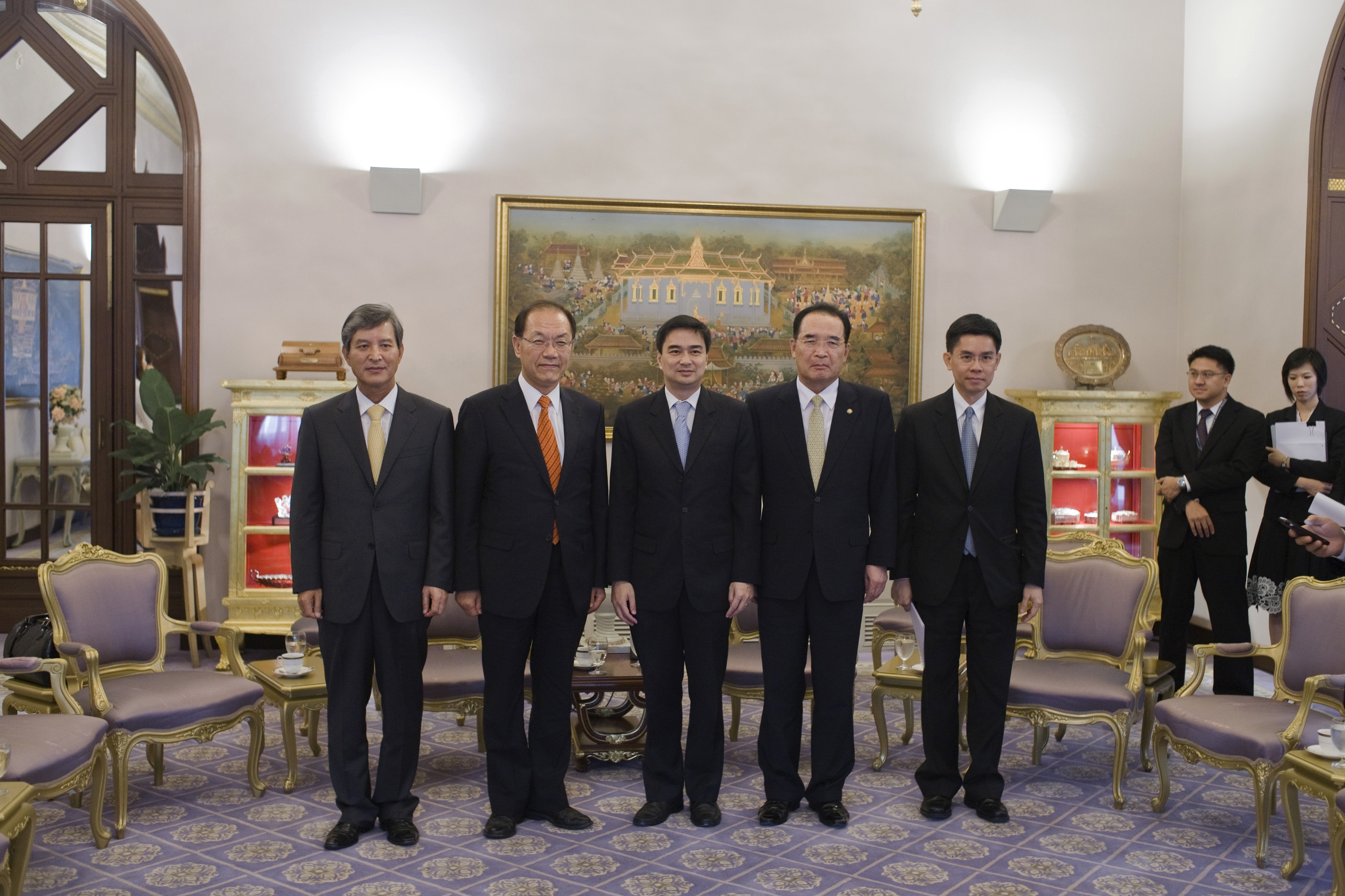 ประธานกลุ่มมิตรภาพสมาชิกรัฐสภาสาธารณรัฐเกาหลี-ไทย เข้าเยี่ยมคารวะนายกรัฐมนตรี ณ ห้องสีม่วง ตึกไทยคู่ฟ้า ทำเนียบรัฐบาล วันจันทร์ ที่ 19 กรกฏาคม พ.ศ.2553 (Photographer attached to the Prime Minister of the Kingdom of Thailand : Peerapat Wimolrungkarat / พีรพัฒน์ วิมลรังครัตน์)